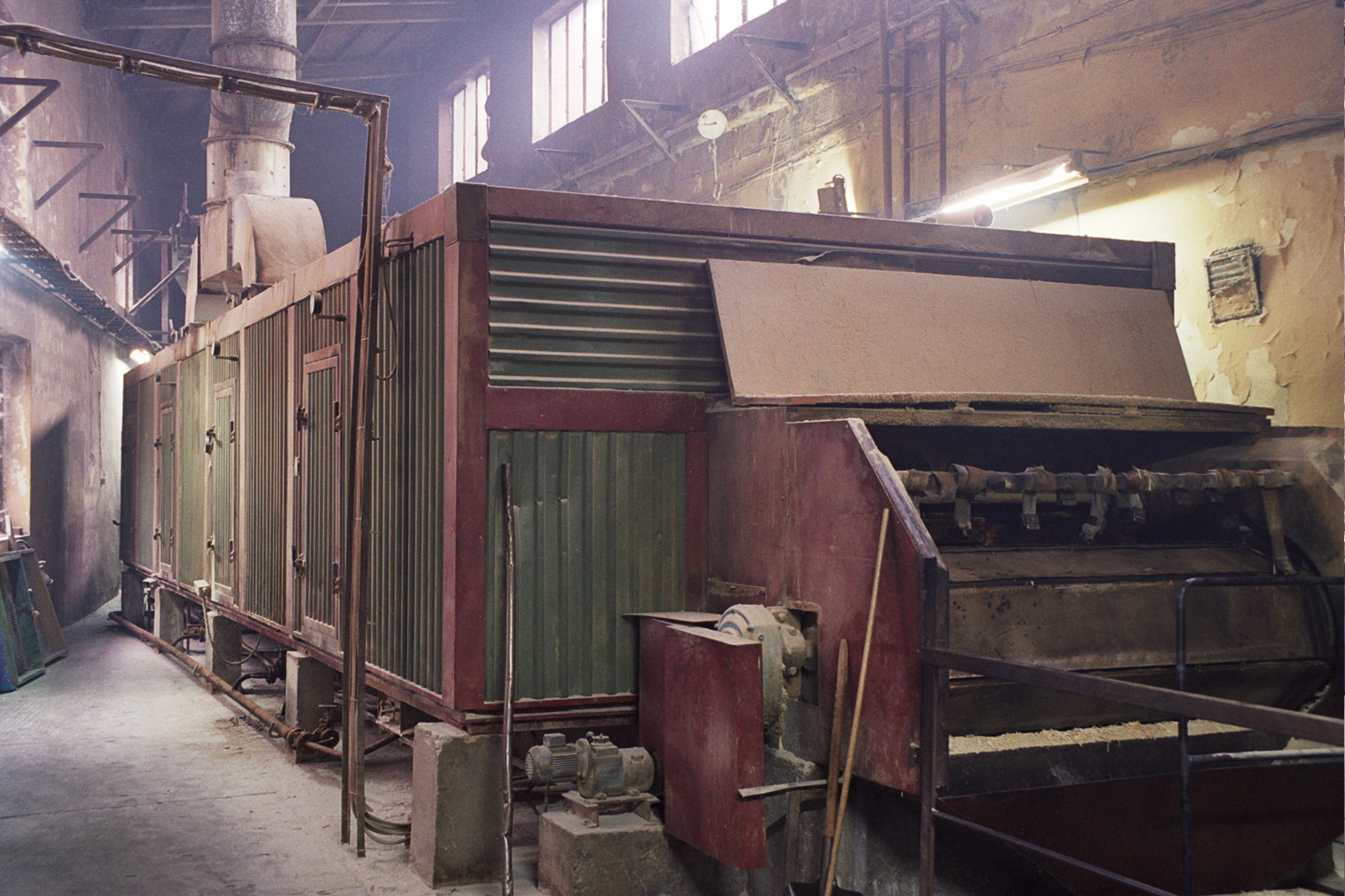 Muzeum produkcji zapałek w Częstochowie - Suszarnia patyczków Author: Przykuta Date: december 2005